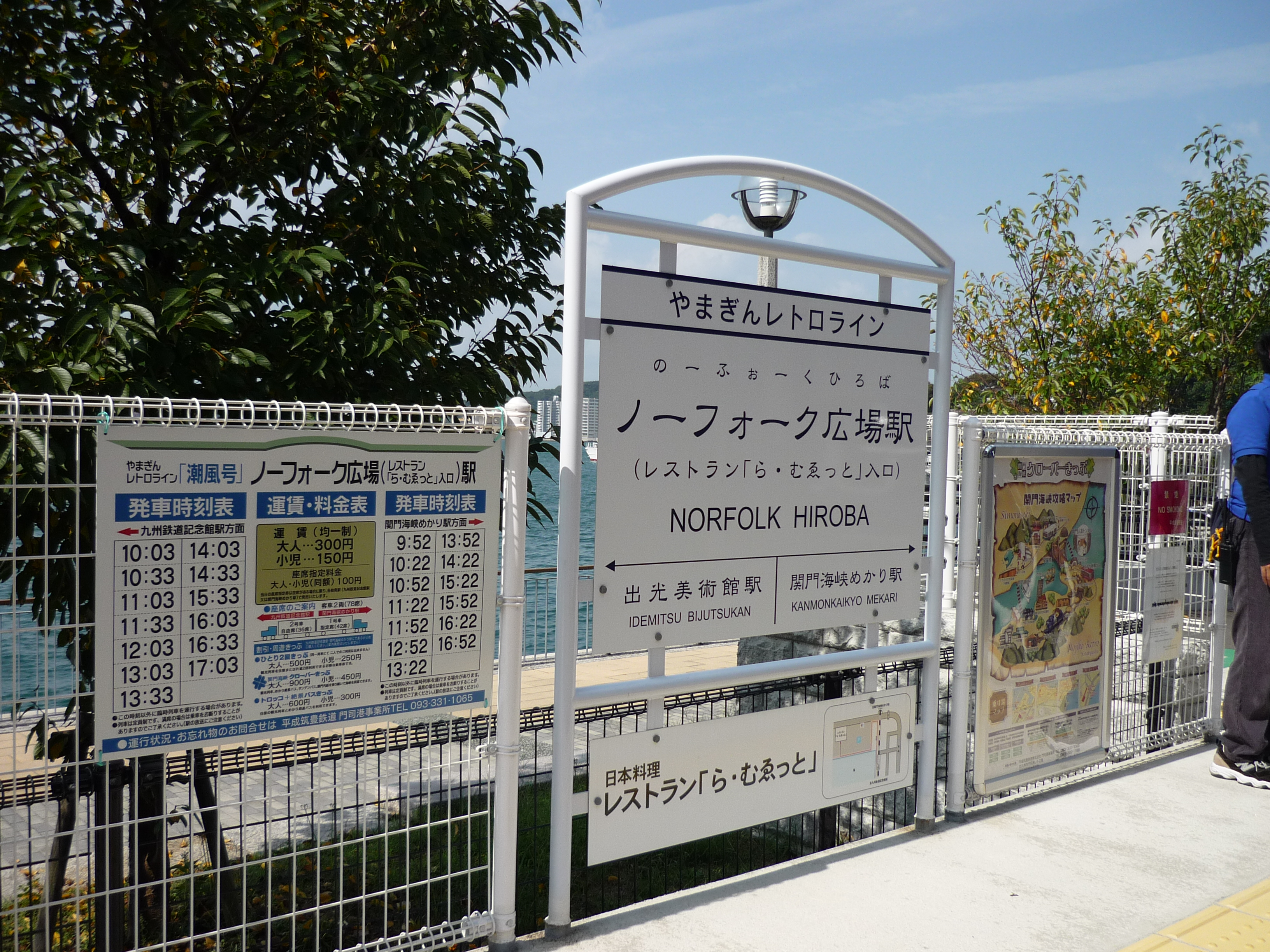 副駅名があった頃のノーフォーク広場駅の駅名標（2009年10月） Panasonic Lumix DMC-FS3